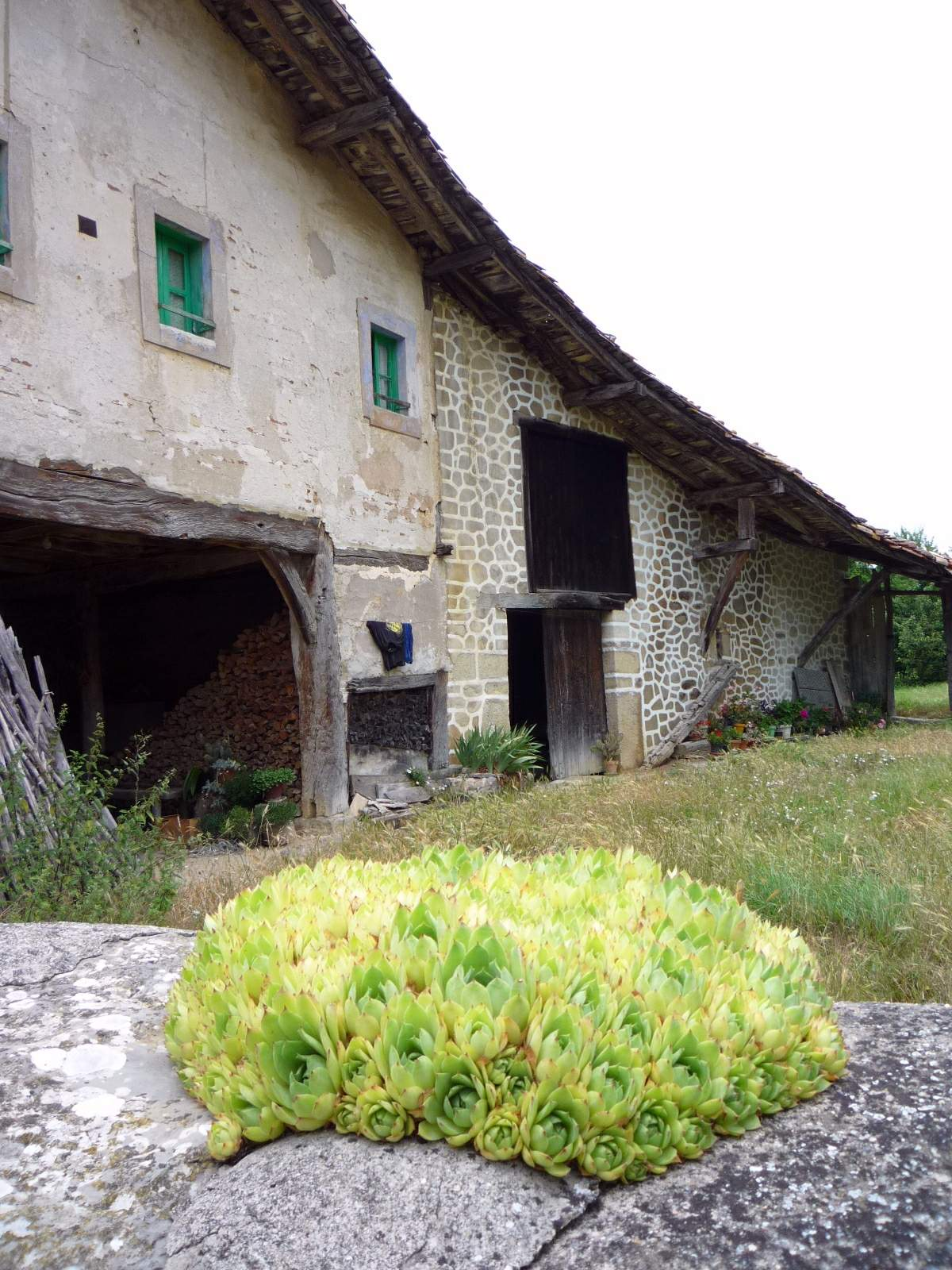 Abezia (Municipio de Urkabustaiz, Álava)